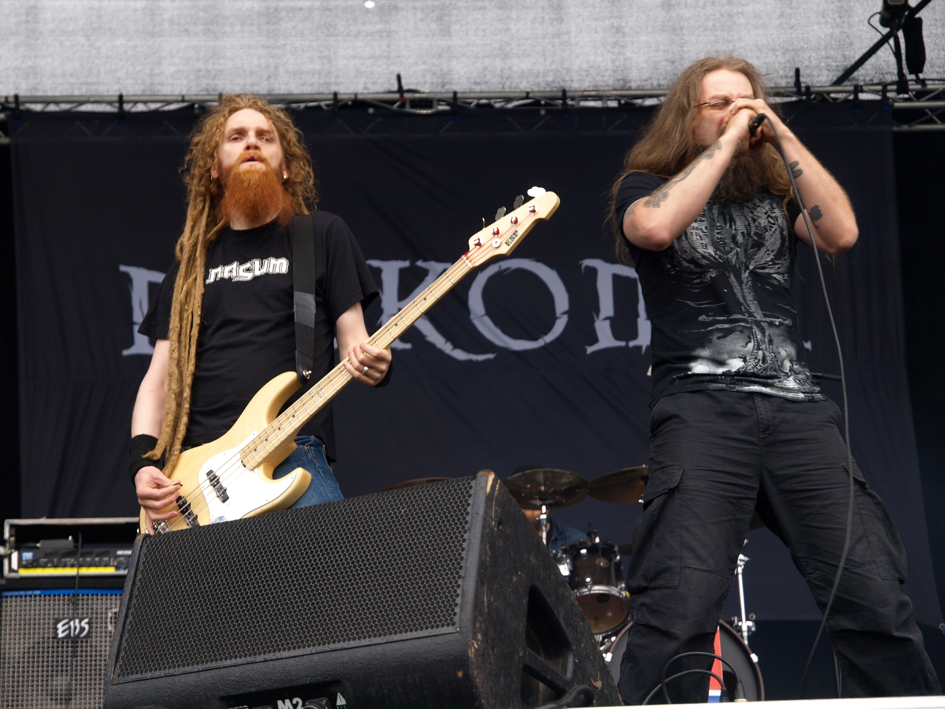 Mokoma live am Myötätuulirock 2011